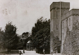 Glen Parva Barracks